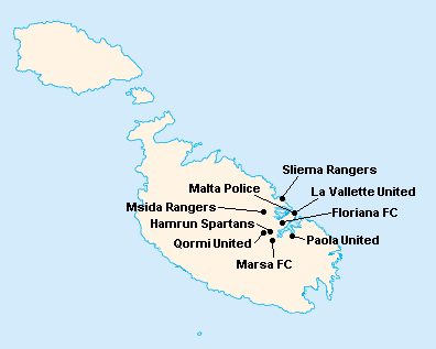 Répartition des clubs en First Division Maltaise 1920-1921.